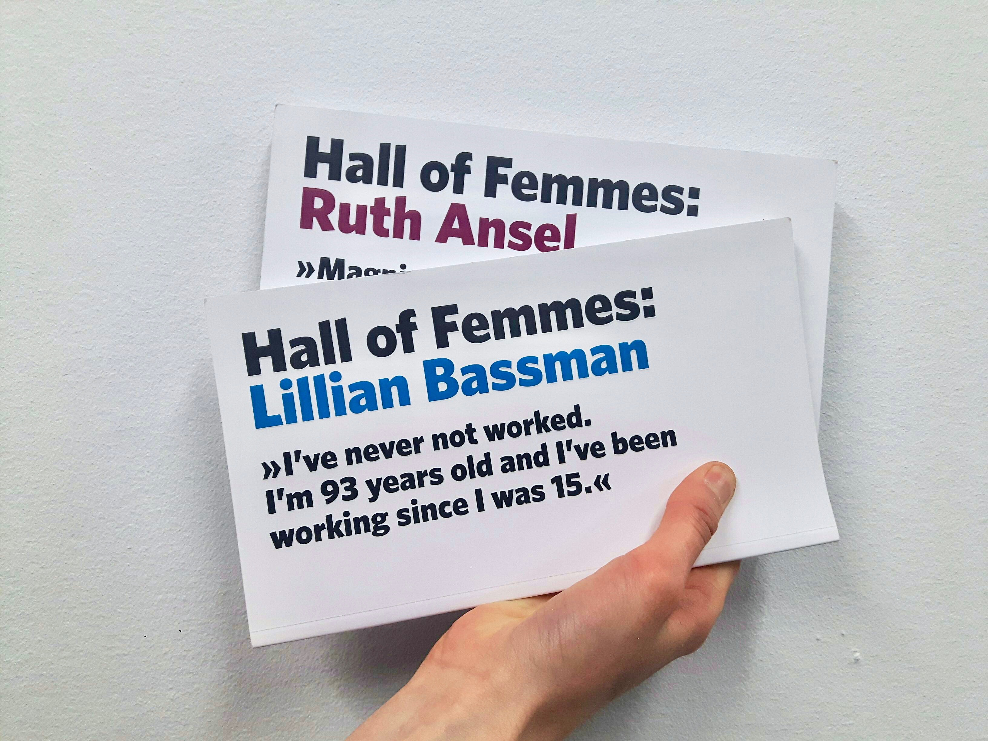 Exemplaires de Lilian Bassman et Ruth Ansel dans la collection Hall of Femmes.